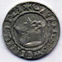 Półgrosz świdnicki. Awers. autor: mzopw